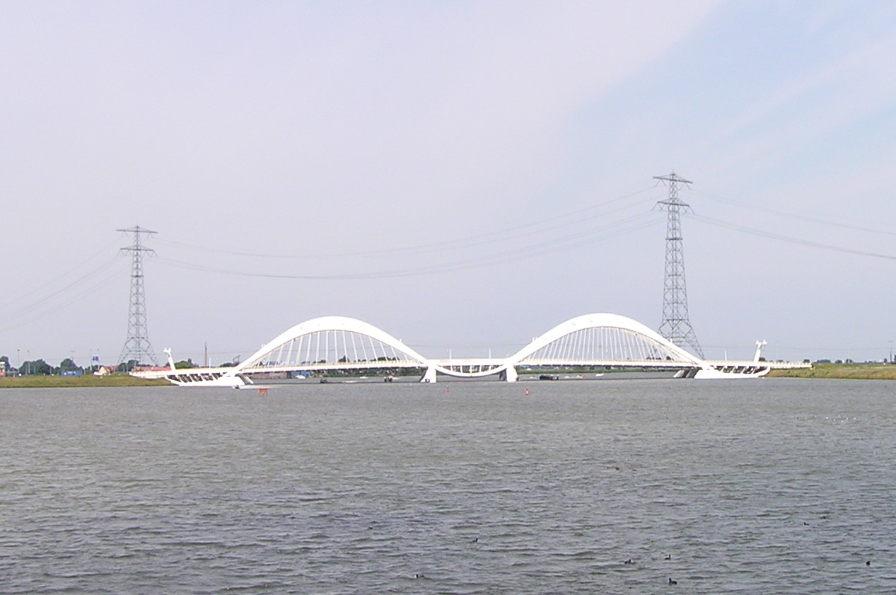 Brug 2001 verbindt het Zeeburgereiland (links) met het Steigereiland van IJburg. De brug werd in 2000 geplaatst en is een ontwerp de Engelse architect Nicholas Grimshaw. De twee grote overspanningen zijn elk 75 meter lang.